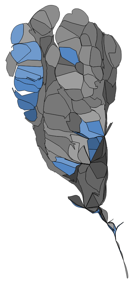 顏色對照表